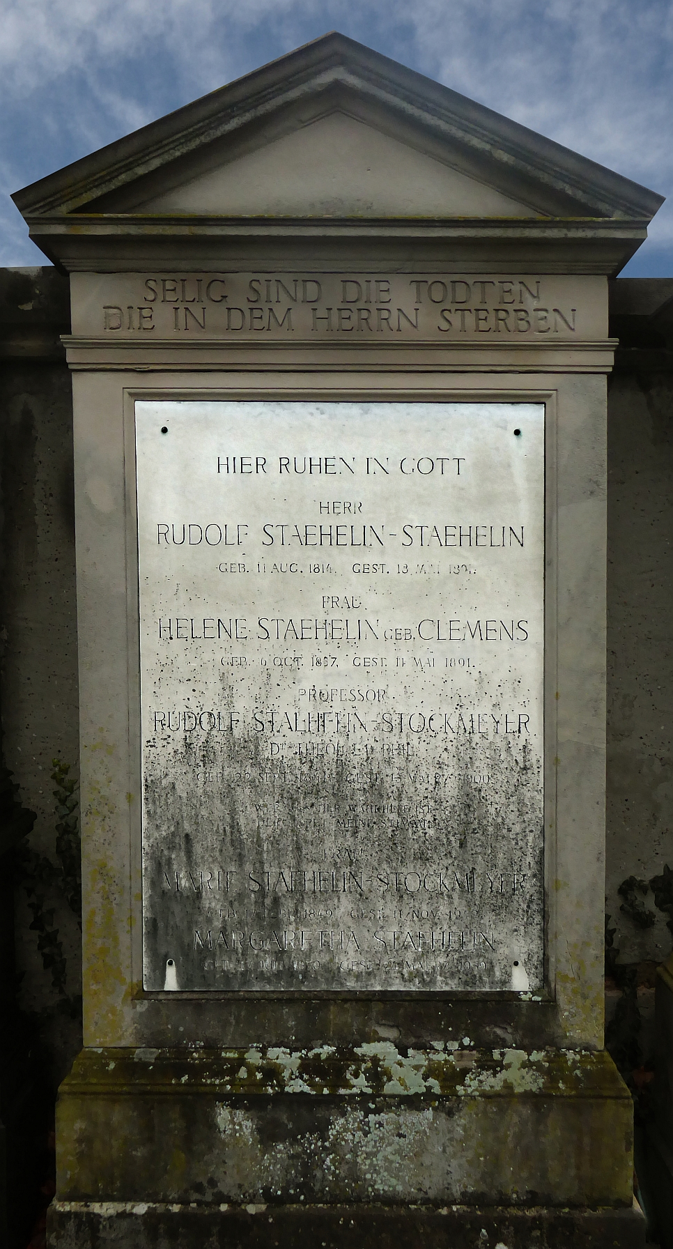 Rudolf Stähelin-Stockmeyer (1841–1900) Dr. theol. Professor der Theologie, Rektor an der Universität. Grab auf dem Friedhof Wolfgottesacker, Basel